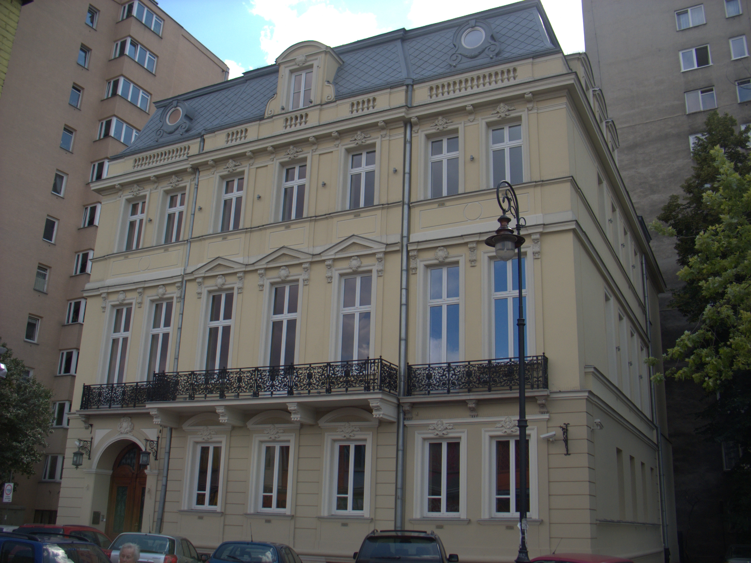 Pałac Janaszów w Warszawie